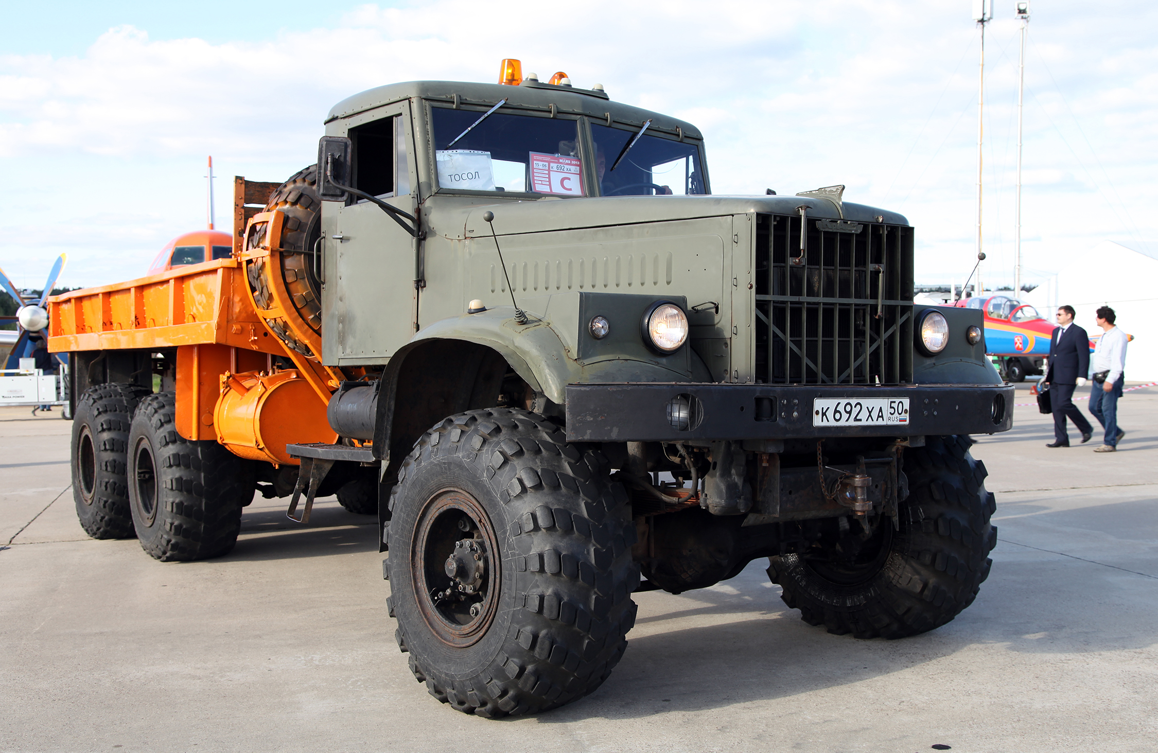 КрАЗ-255Б (KrAZ-255B)